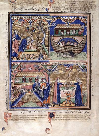 Morgan Bible full page